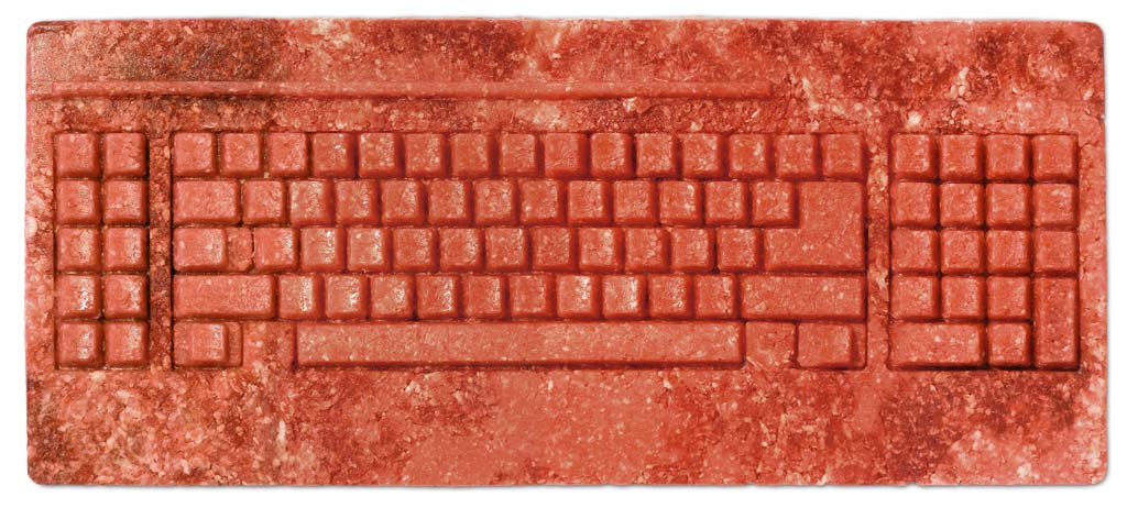 Arbeit am Fleisch, Computertastatur aus faschiertem Fleisch